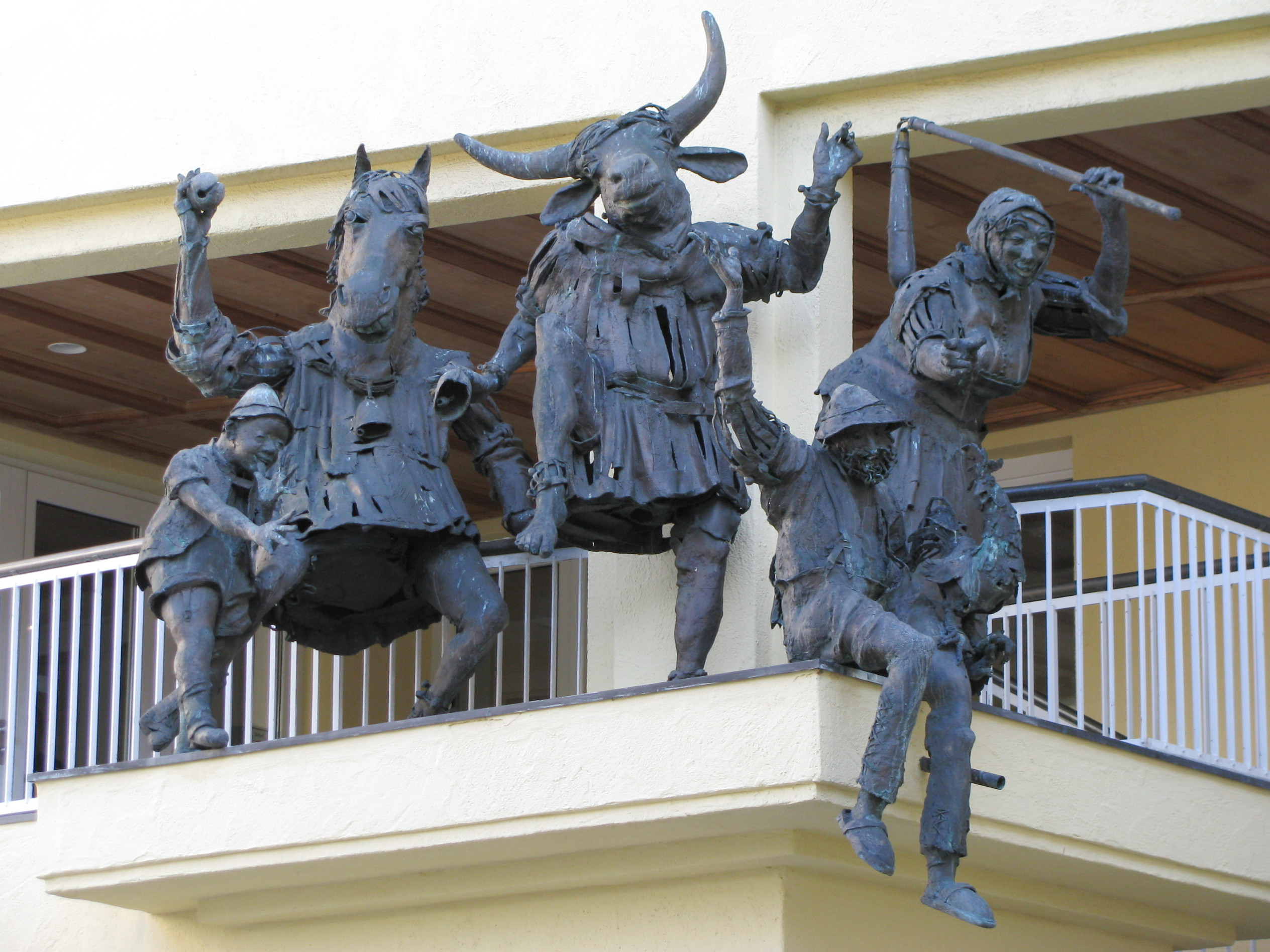 Figuren des Egga-Brunnens am Rathaus Sonthofen